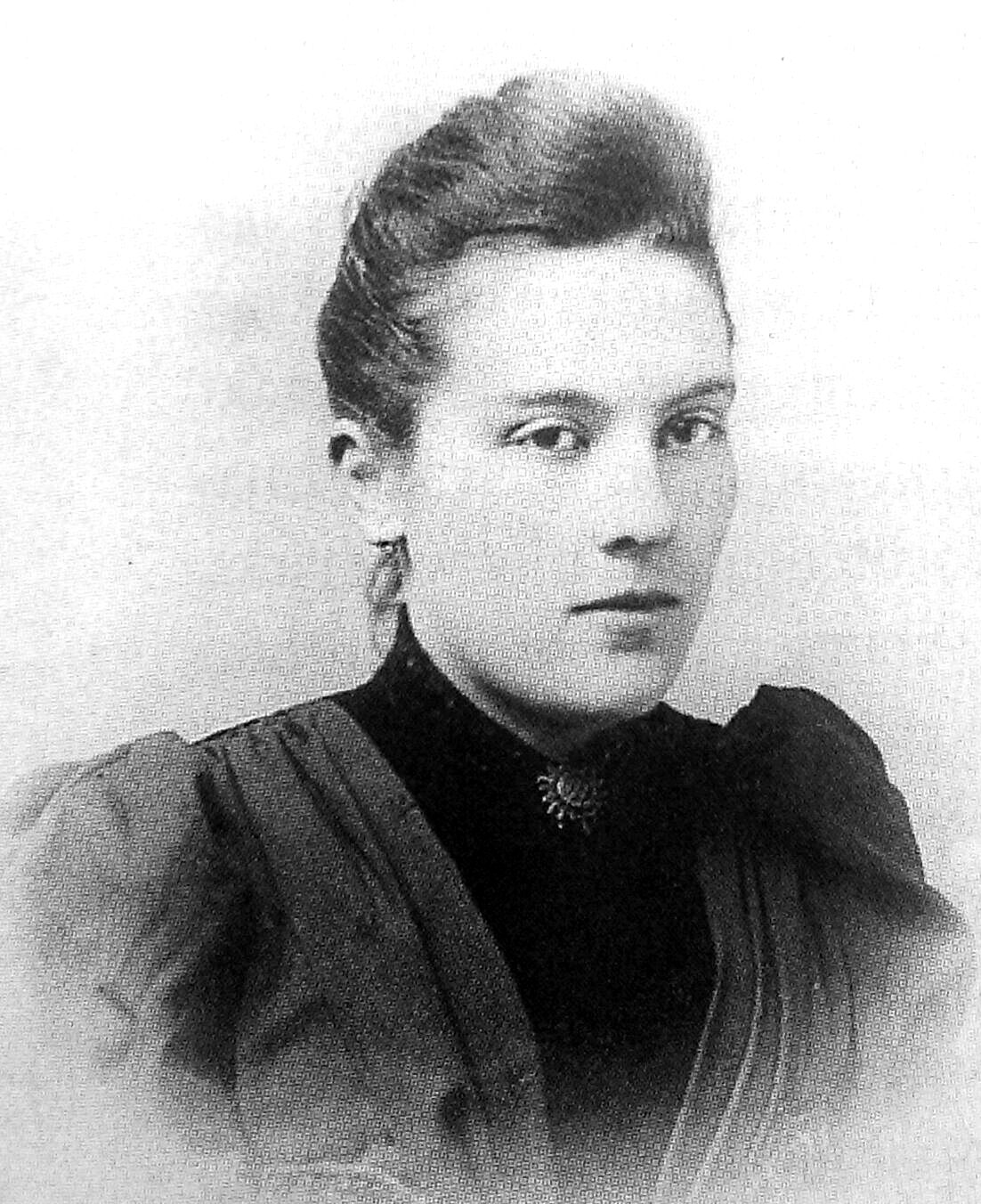 Portretfoto van Catharina de Mare uit1892